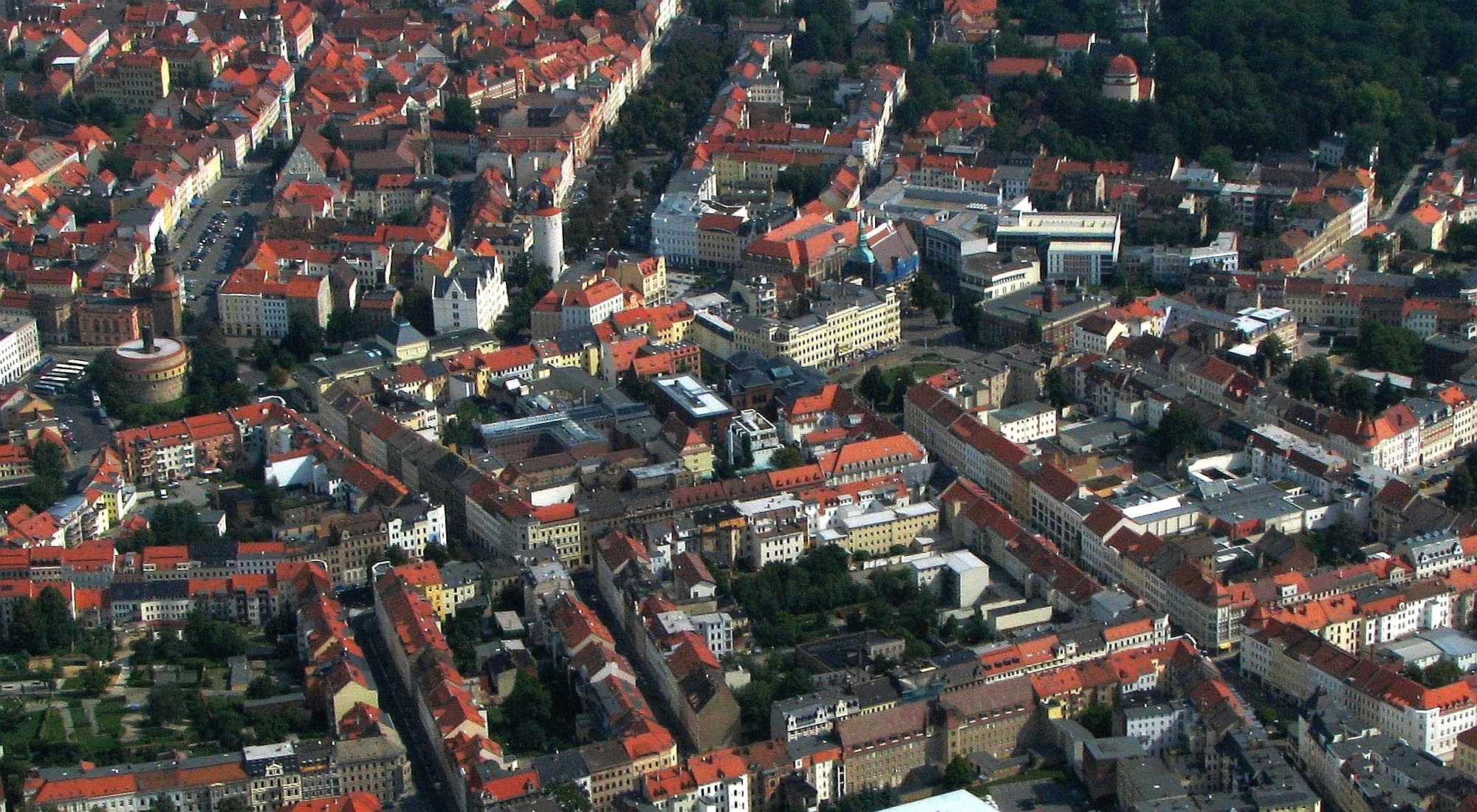 Görlitz Luftbild Innenstadt Kaisertrutz Marienplatz Postplatz Sachsen Saxony Germany Foto 2008 - Wolfgang Pehlemann Wiesbaden PICT4431